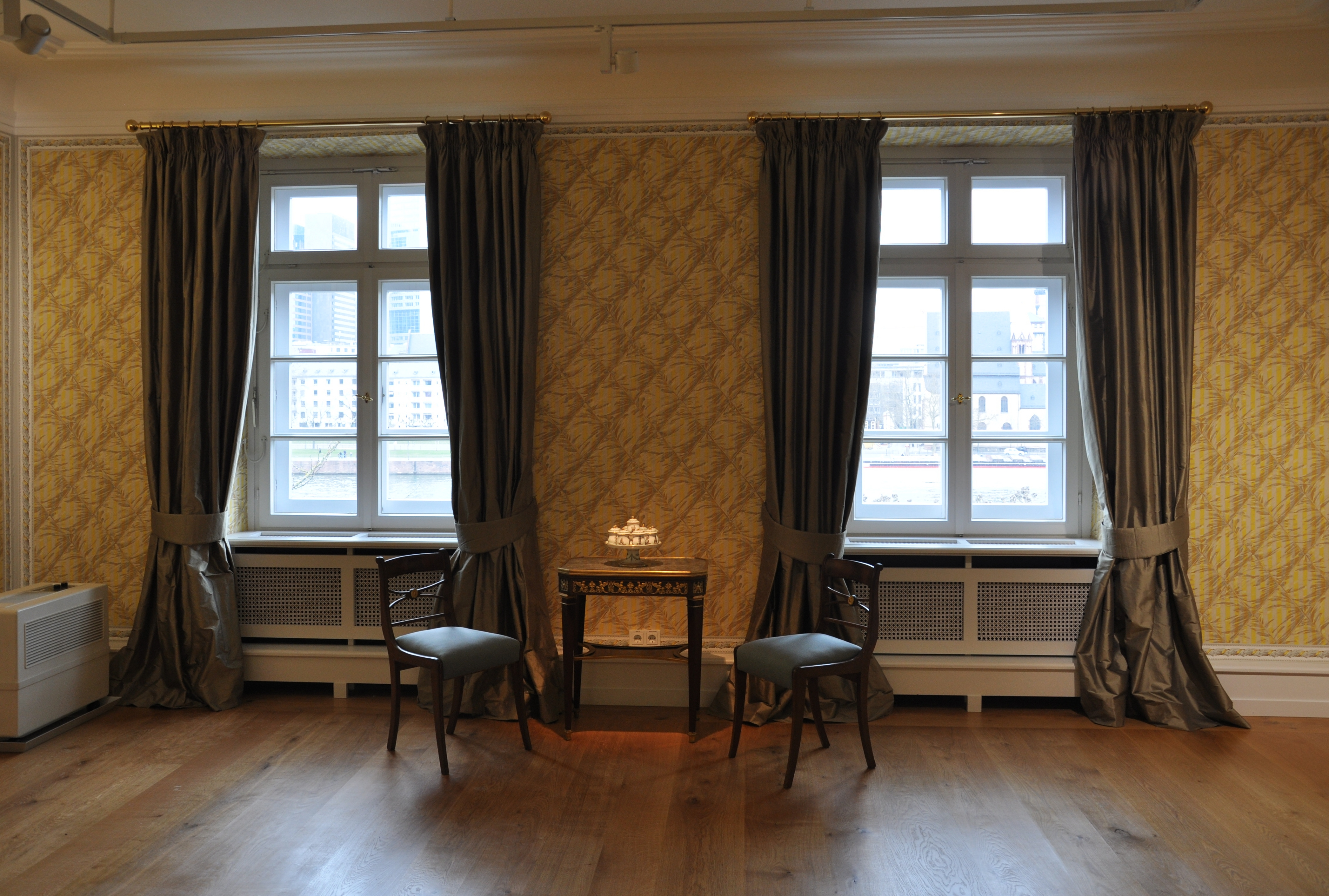 Museum für Angewandte Kunst Frankfurt; Villa Metzler